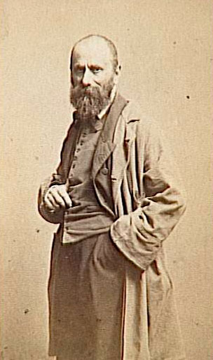 portrait du peintre Constant Joseph Brochart (1816-1899)